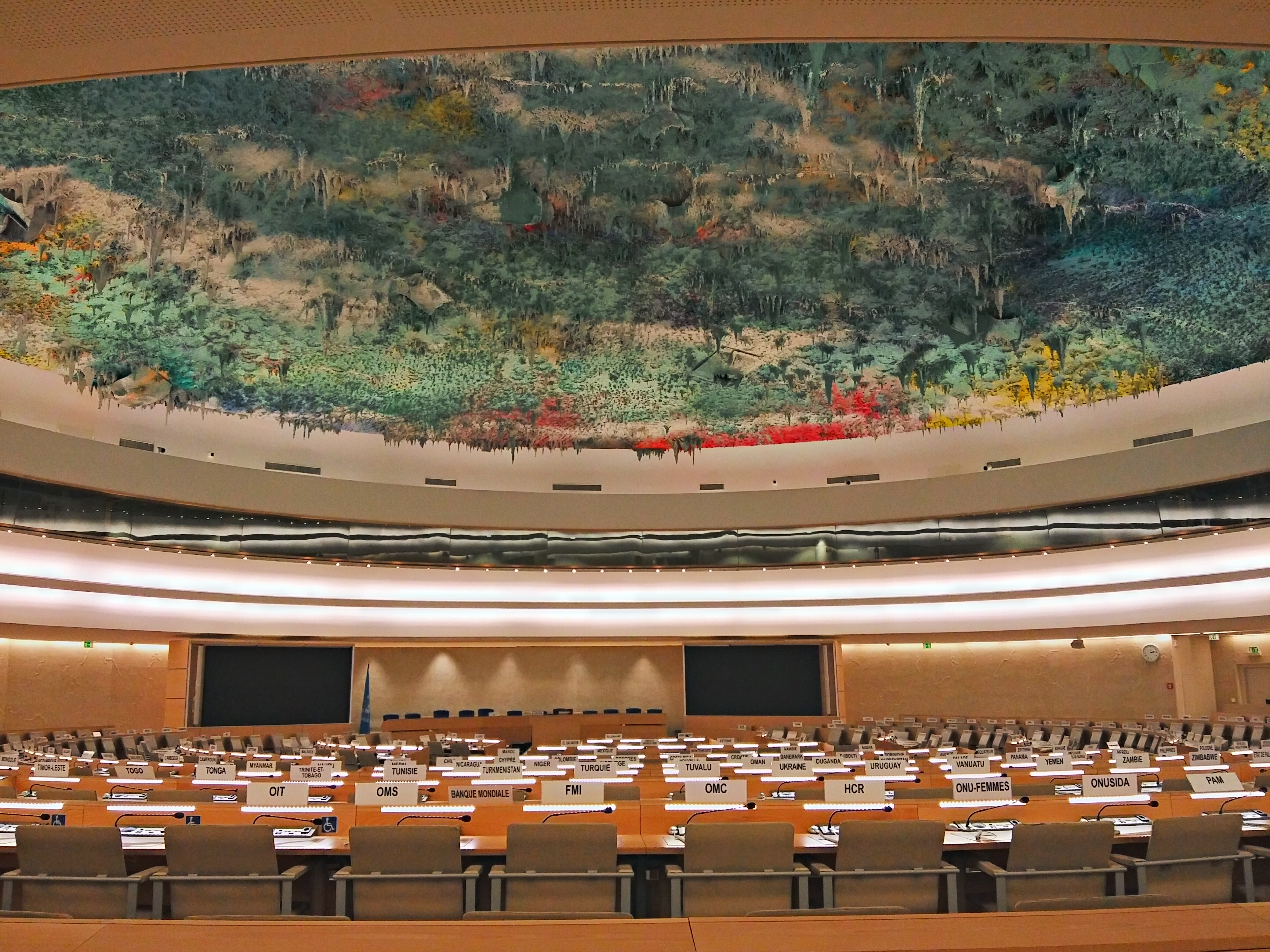 en: Human Rights and Alliance of Civilizations Room (Palace of Nations). fr: Salle du conseil des droits de l'homme onu Genève